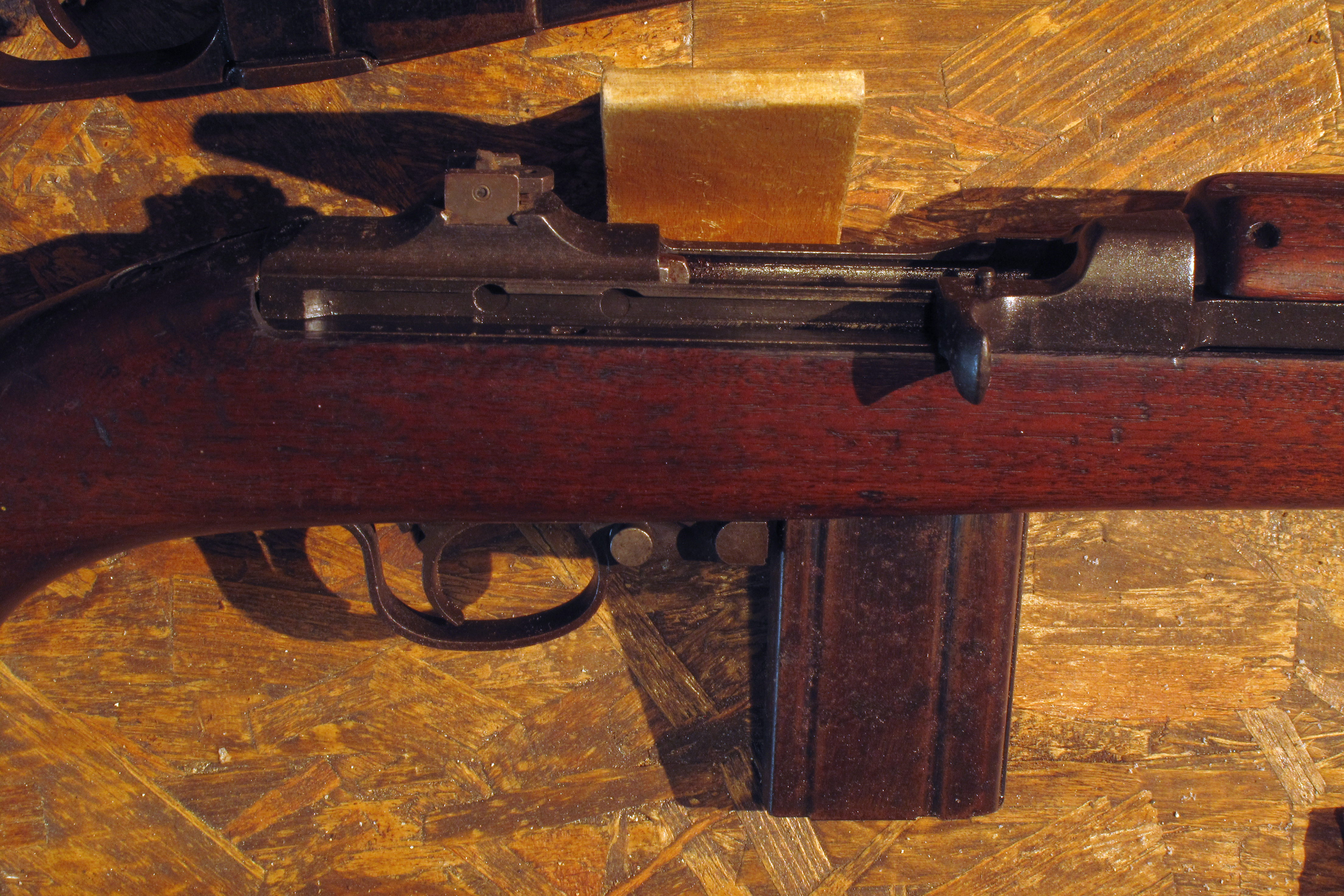 M1 carbine